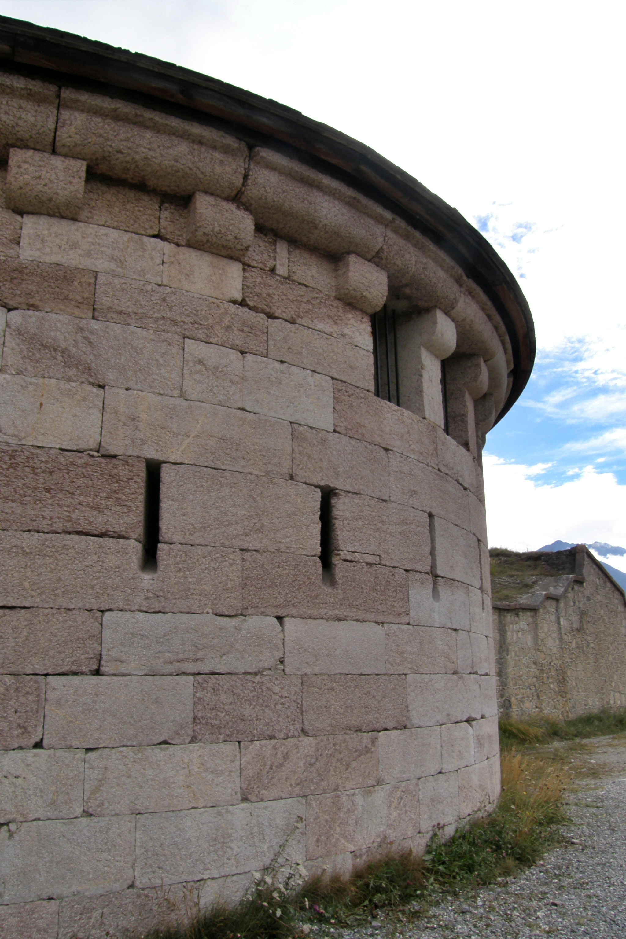 Partie arrière de la lunette d'Arçon, fort Mont-Dauphin, canton de Guillestre, département des Hautes-Alpes, France. .